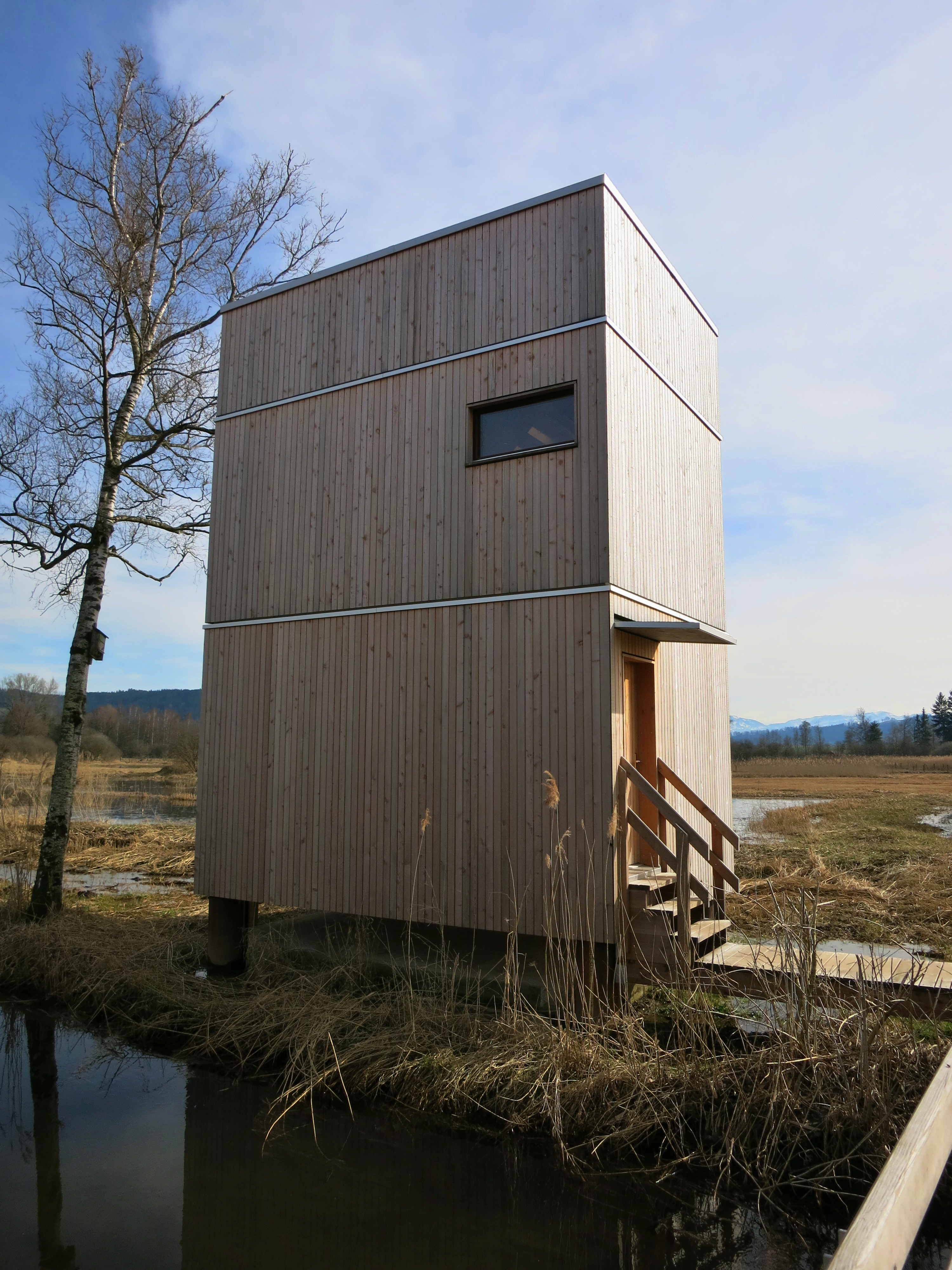 Beobachtungsturm_Wauwilermoos